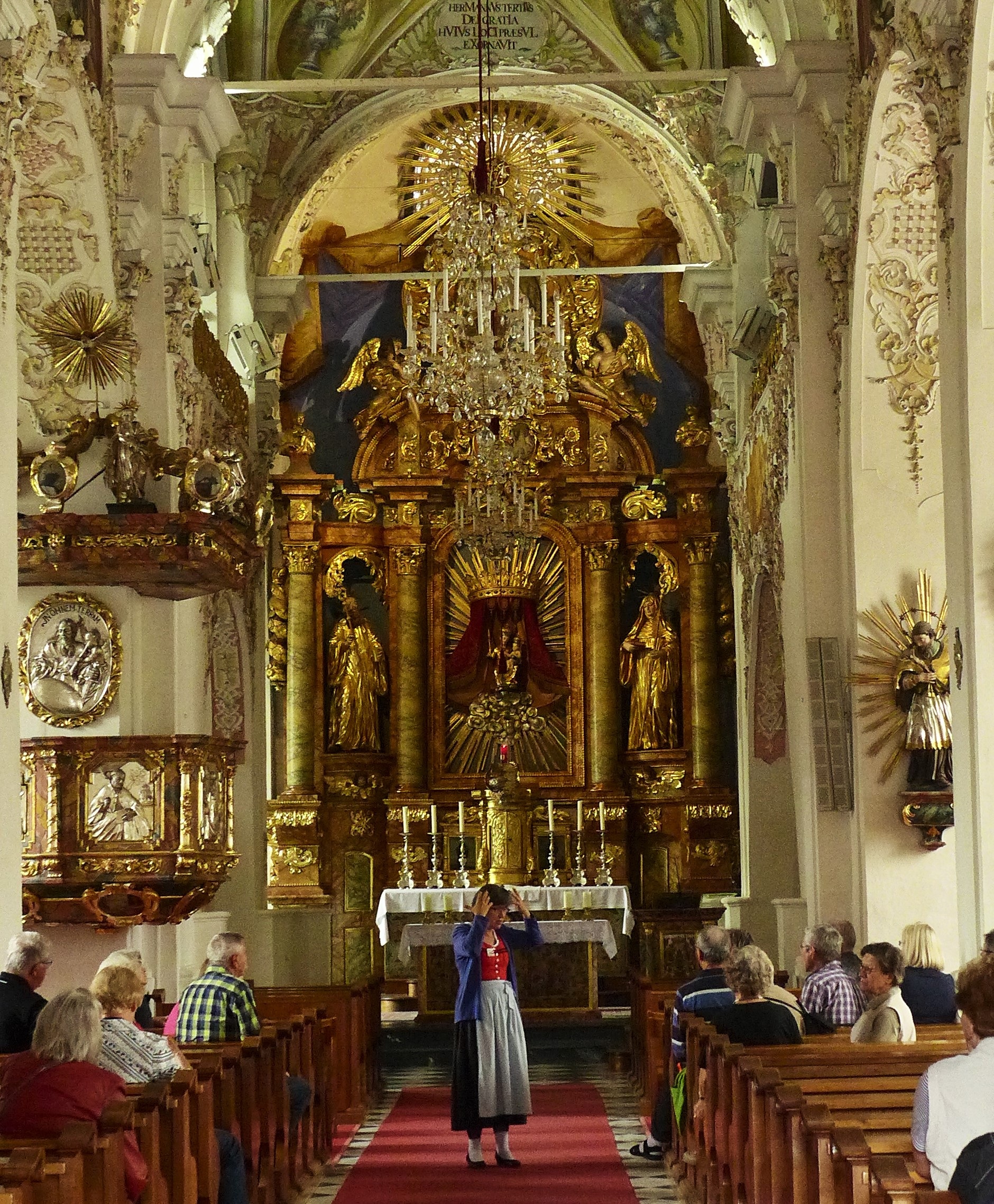 Ossiach plébániatemplomának főoltára retablóval (Ausztria)